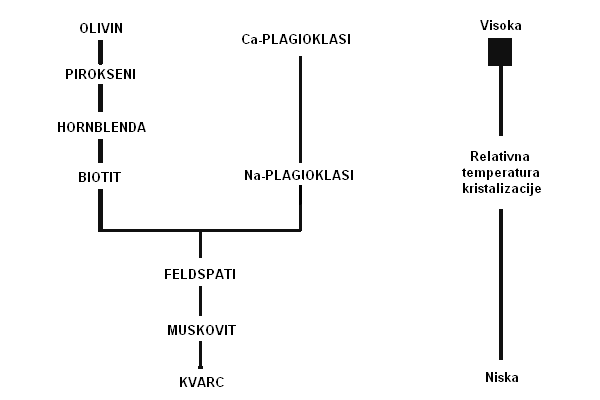 Bowenov reakcijski niz kristalizacije minerala iz magme.